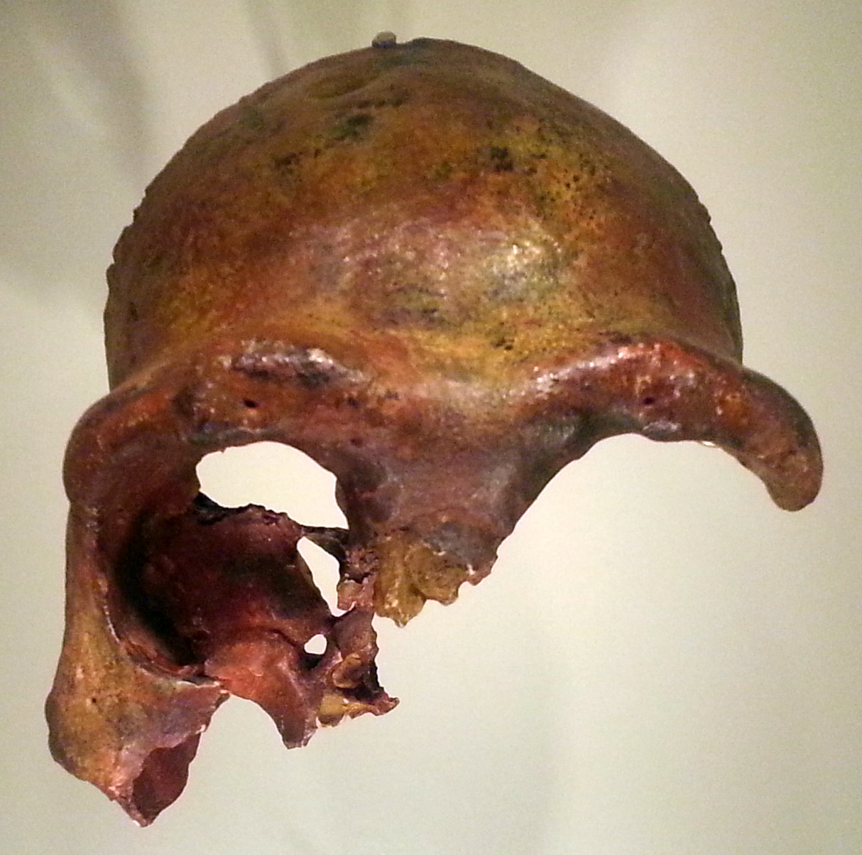 גולגולת "האדם הגלילי", מוצגת במוזיאון ישראל בירושלים. Galilee Man from Zuttiyeh cave in Israel